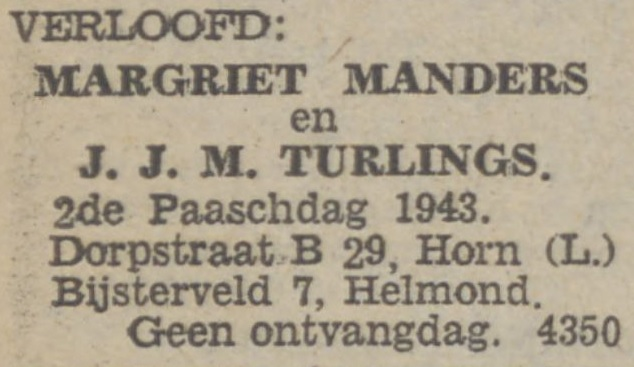 Verloving Jo Turlings en Margriet Manders. Uit De Nieuwe Koerier. Maas- en Roerbode, 56e j.g., nr. 90 (zat. 17 april 1943).